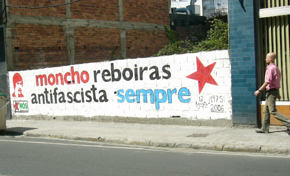 Ferrol: Mural dedicado em 2006 a Reboiras, na cidade em que caiu morto a tiro pola Polícia franquista.